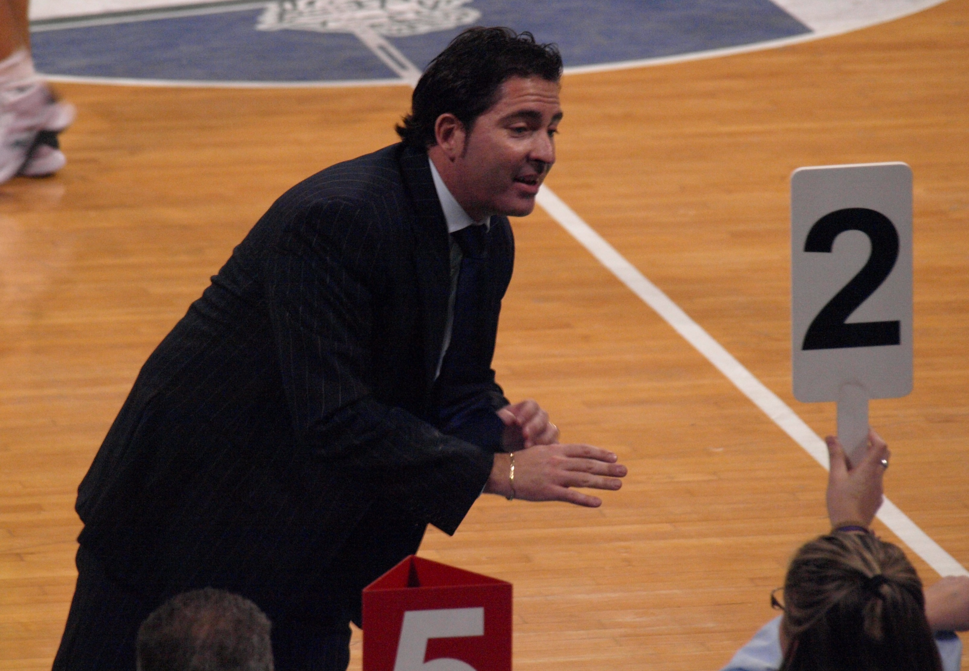 Xavi Pascual, se dirige a la mesa de anotadores en el partido que enfrentó al FC Barcelona y al DKV Joventut de liga ACB en el Olímpico de Badalona en enero de 2009